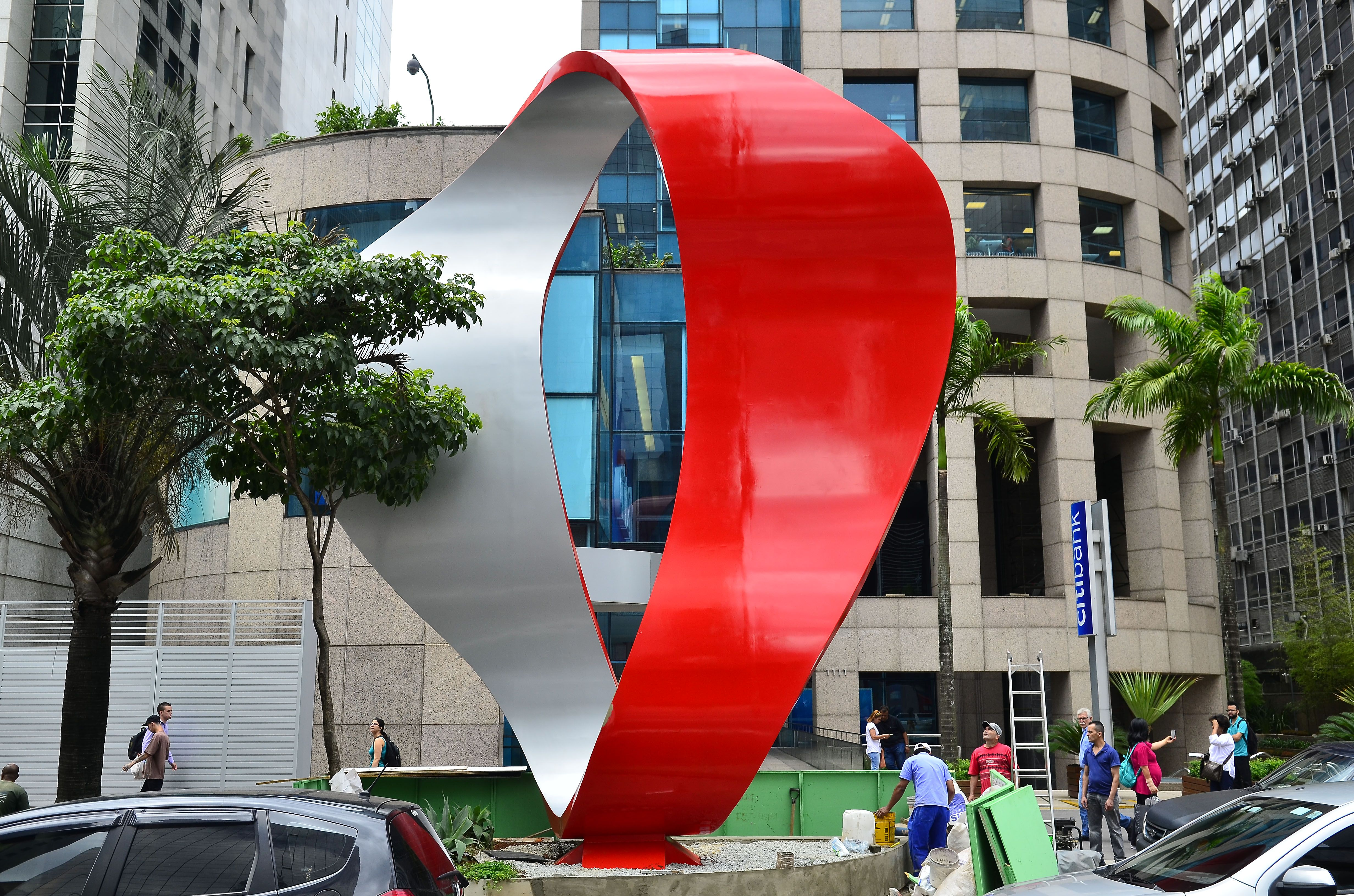 São Paulo - Escultura da artista plástica Tomie Ohtake, instalada na Avenida Paulista